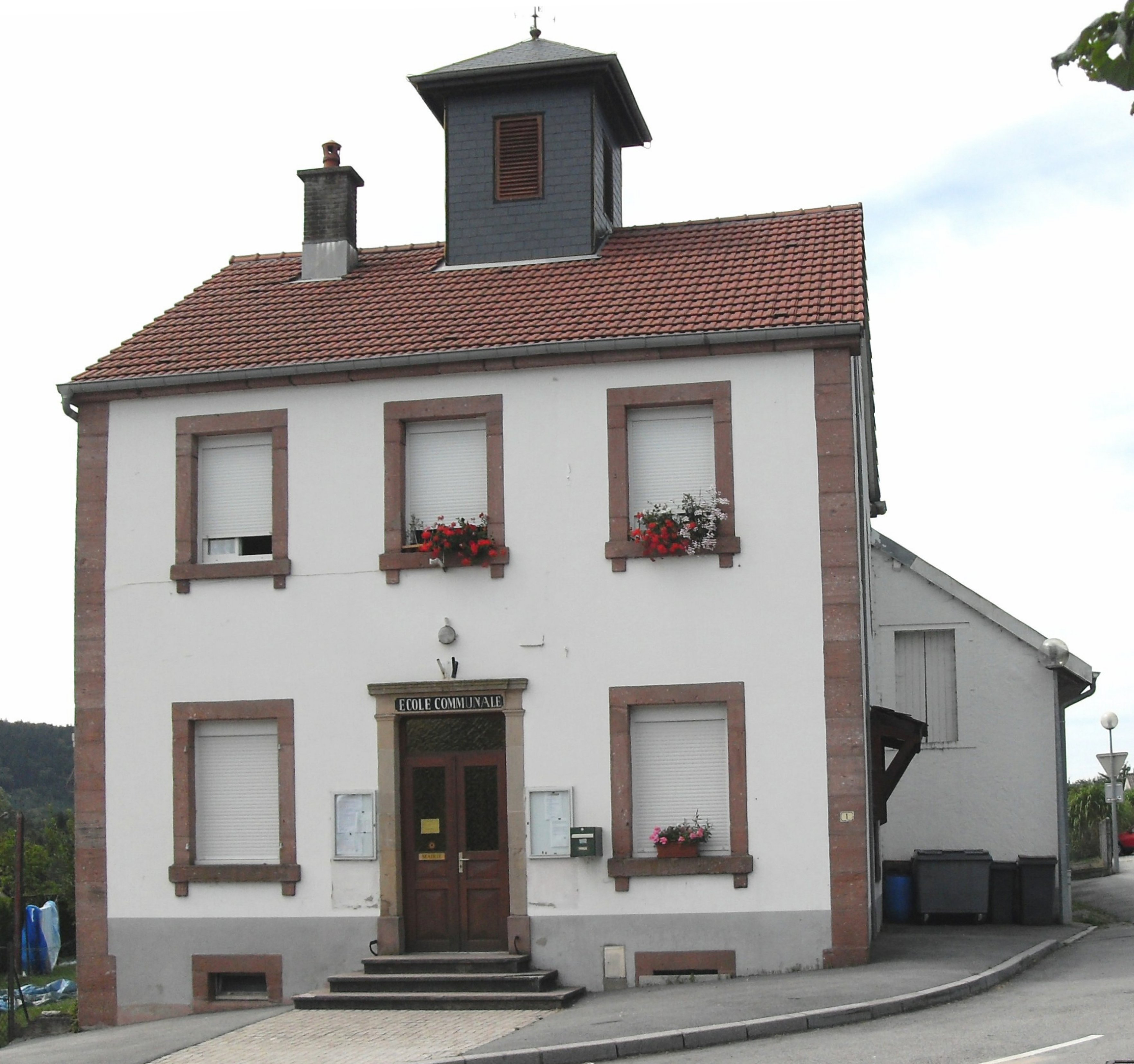 Mairie-école de Faucompierre